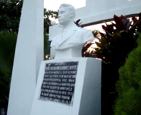 Busto del General Martinez en su ciudad natal de San Matias, La Libertad